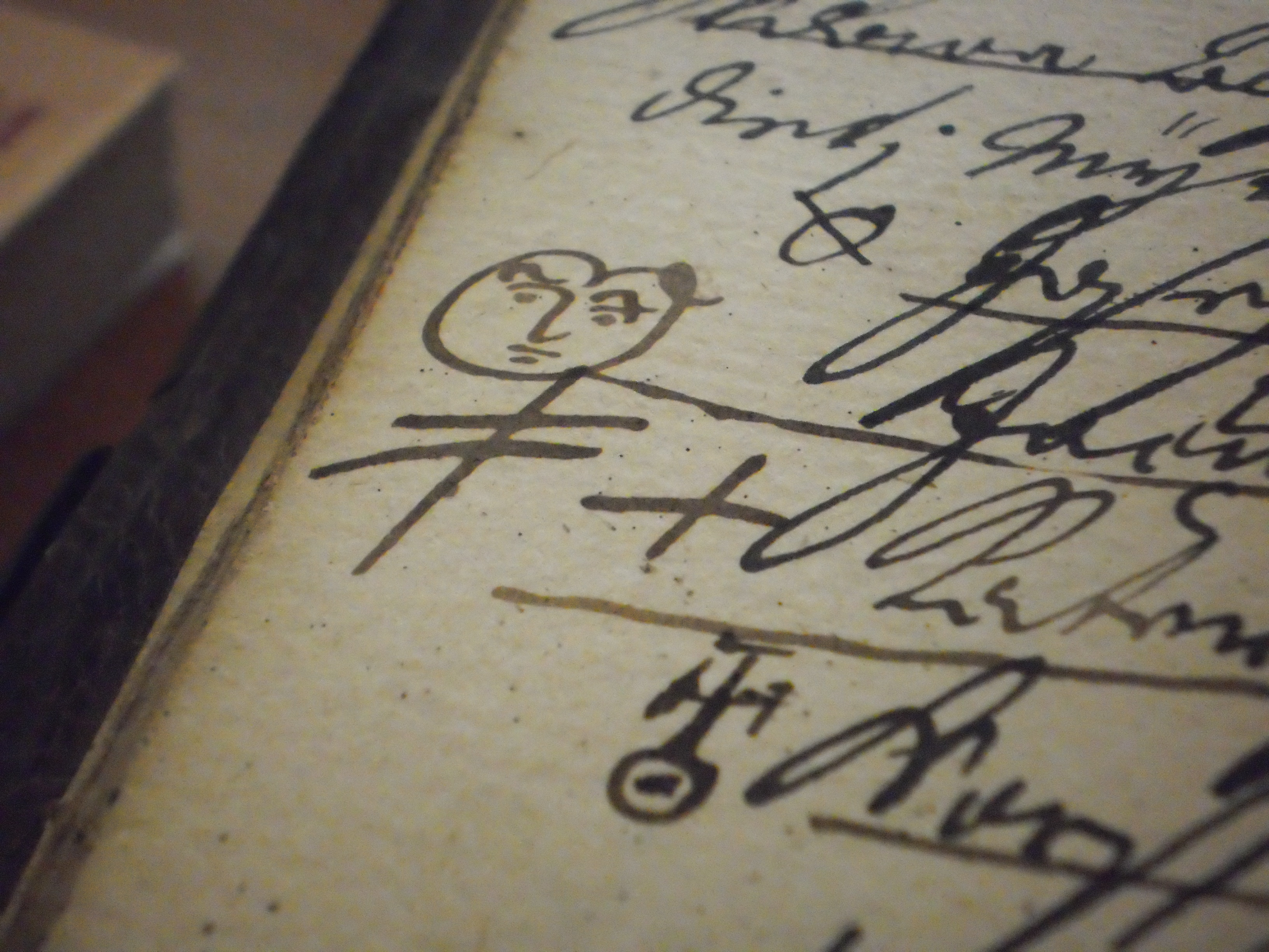 Snímek detailu z gruntovní knihy velkostatku Hluboká nad Vltavou, Lišov - Hůrkym, 1685-1855. Fond SOA Třeboň.